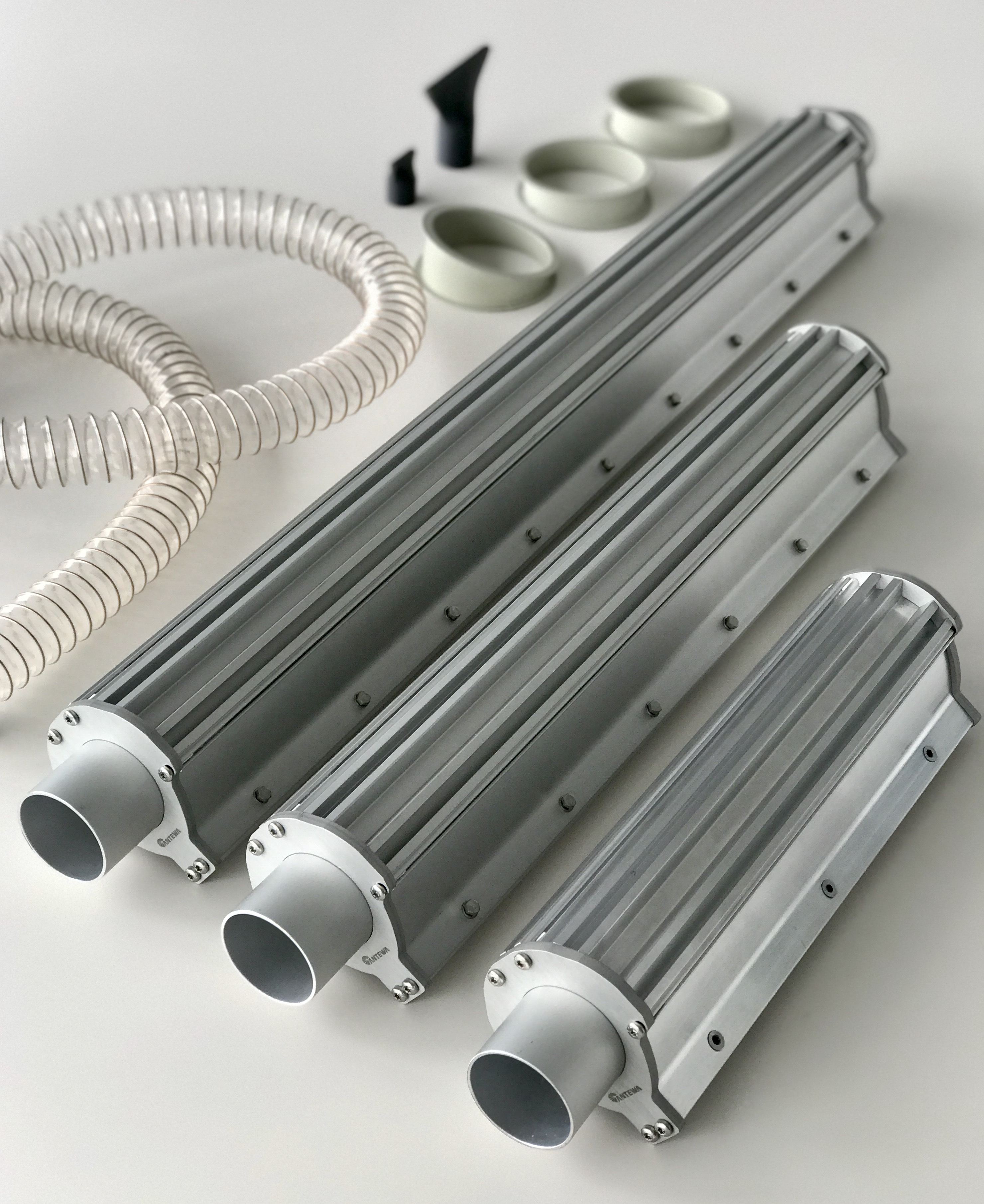 Verschiedene Air KNife Düsen der Firma HTK-Vent